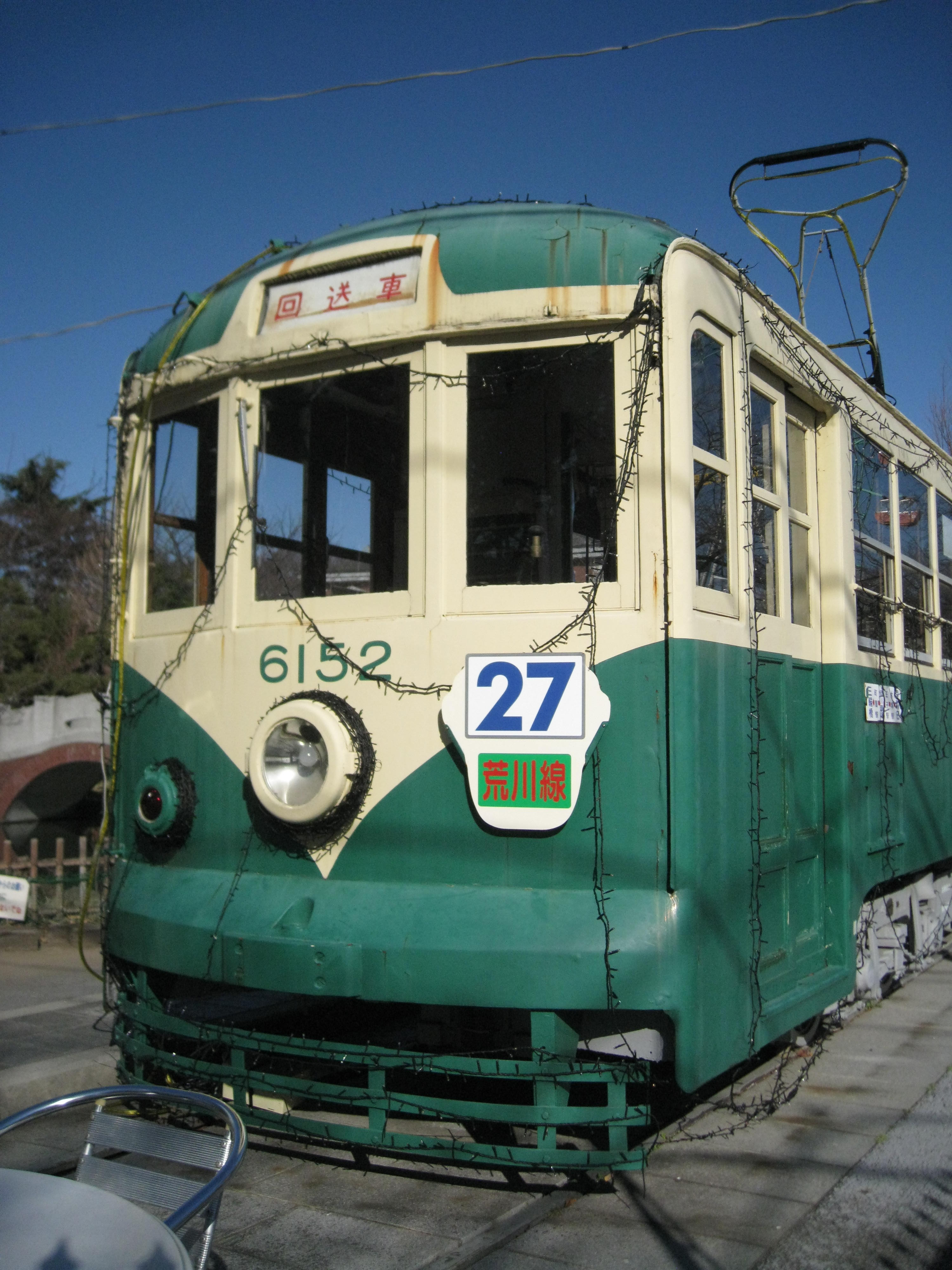 荒川遊園地内で静態保存されている一休さん(6152号車)